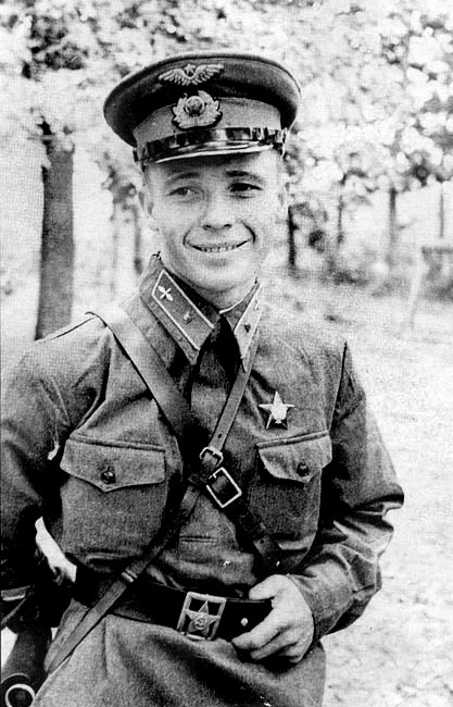 Советский лётчик Виктор Талалихин